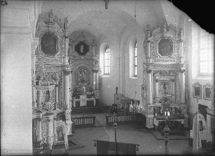 Беларуская (тарашкевіца): Клецак (Klecak), Фарны касьцёл (Fara)